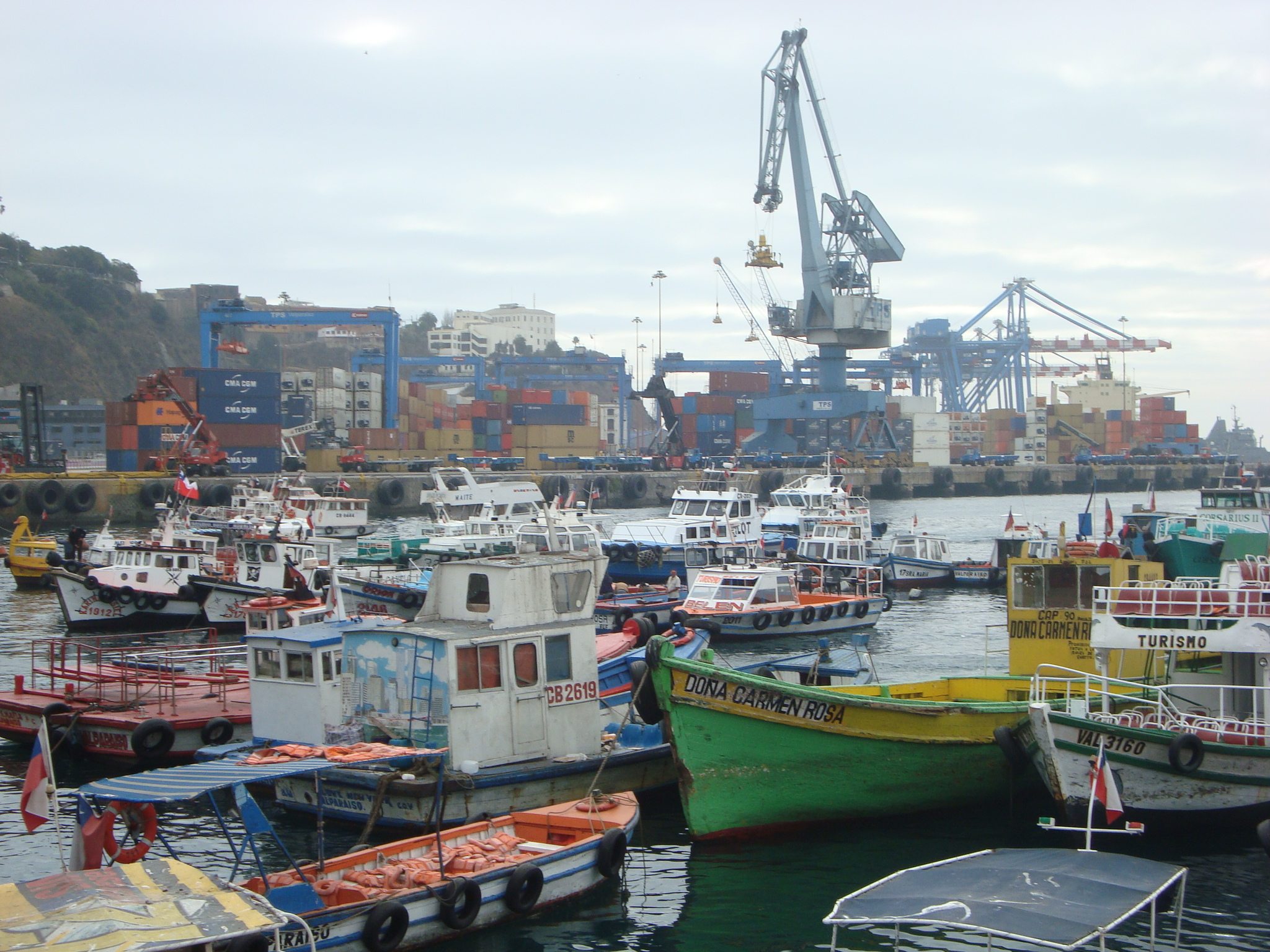 Muelle Prat